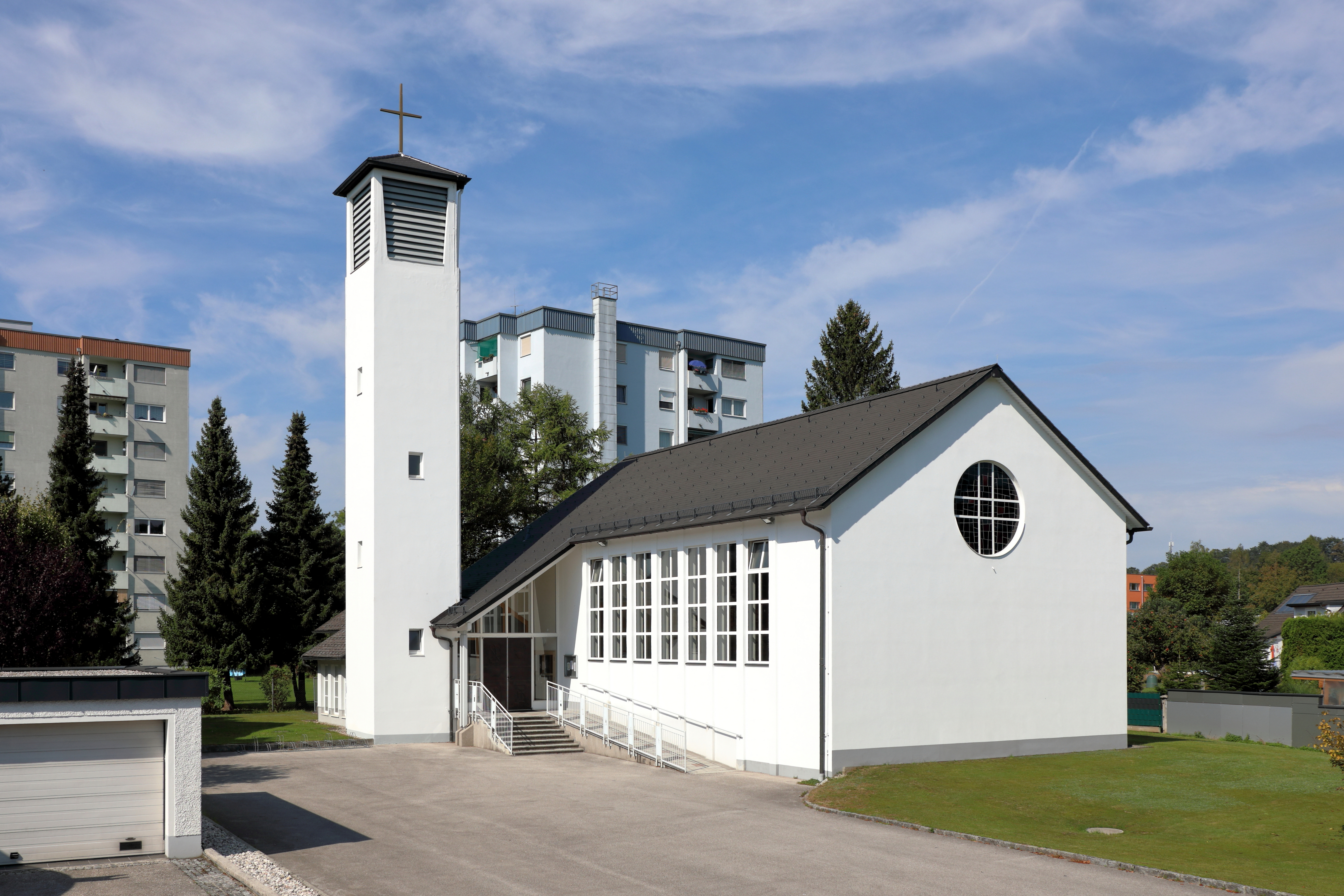 Ostansicht der Dreieinigkeitskirche in der oberösterreichischen Stadtgemeinde Laakirchen. Die evangelische Kirche mit einem Fassungsraum von rund 200 Personen wurde ab 1961 errichtet und 1964 geweiht.